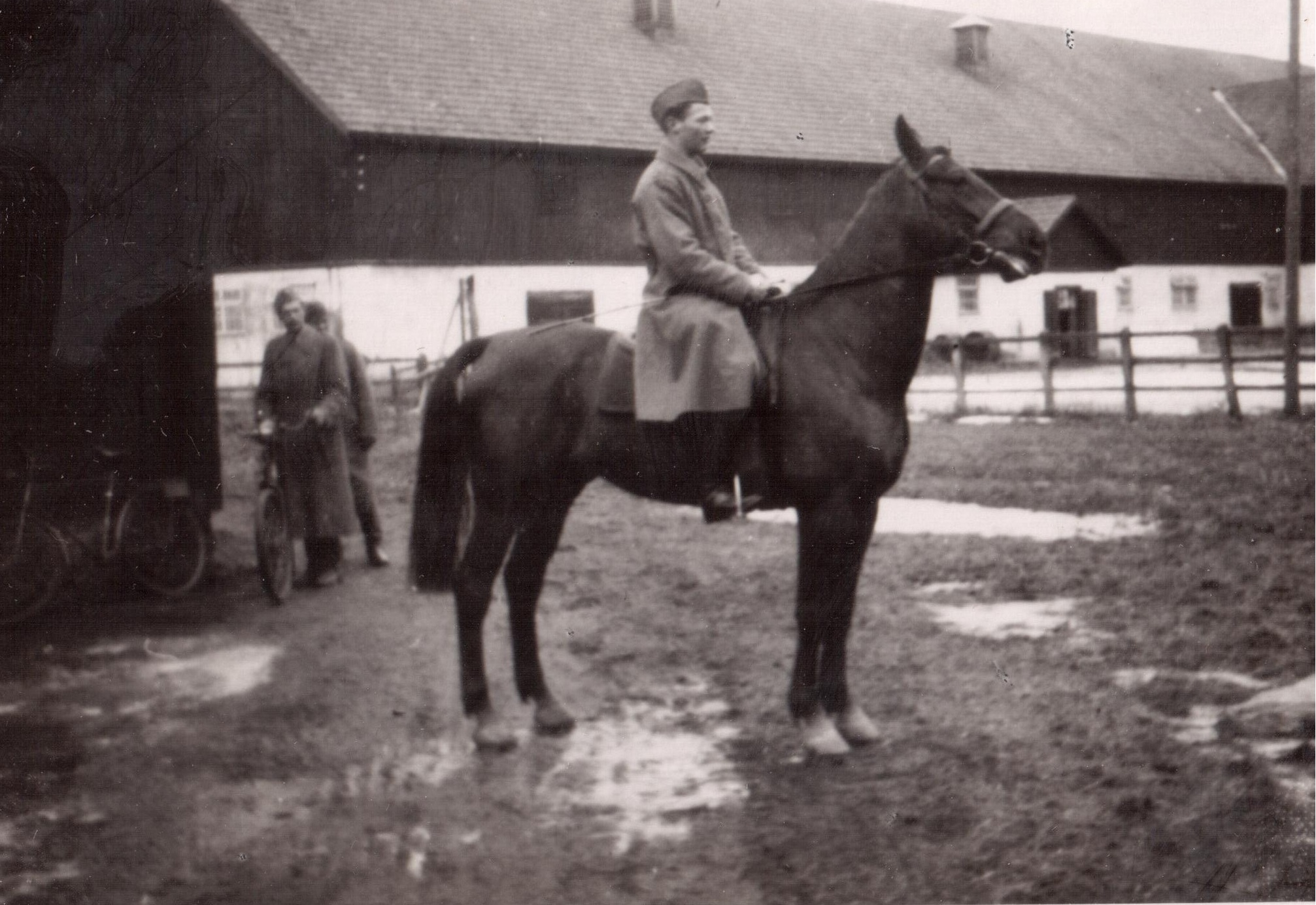 Svensk militär, handbollsspelare och ryttare. På en häst som hette Iller.